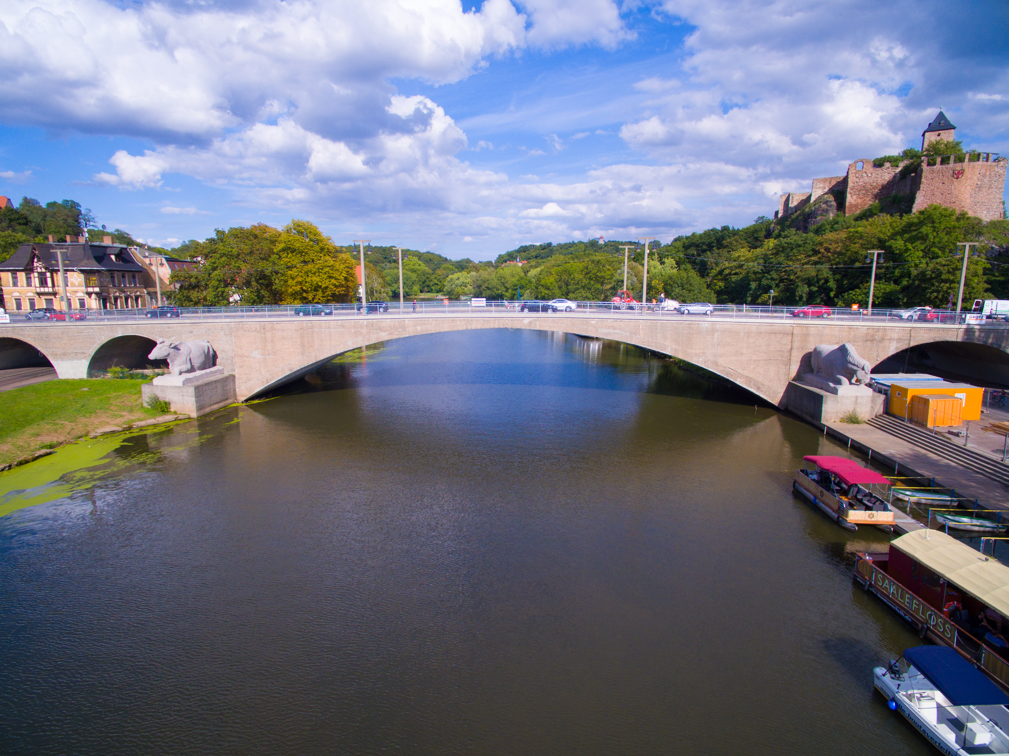 Giebichensteinbrücke